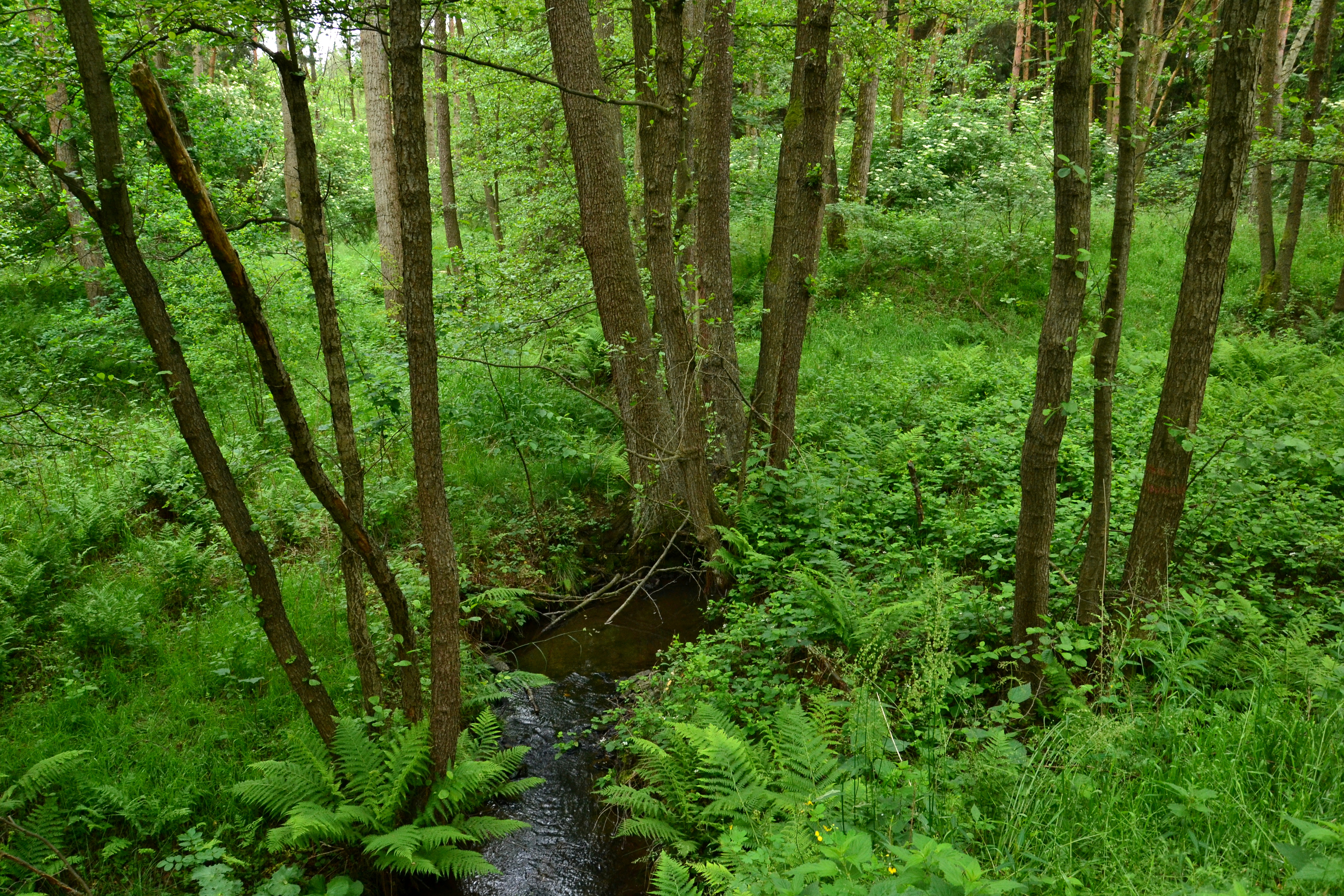 Ostrovecká olšina